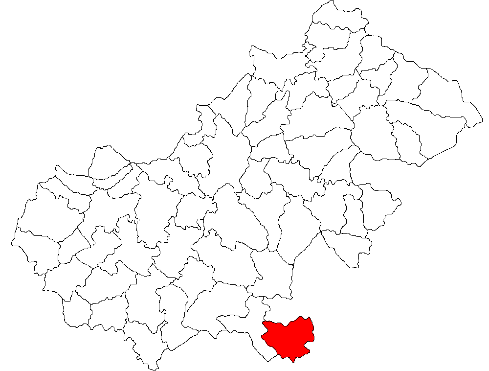 Categorie:Hărţi ale judeţului Satu Mare